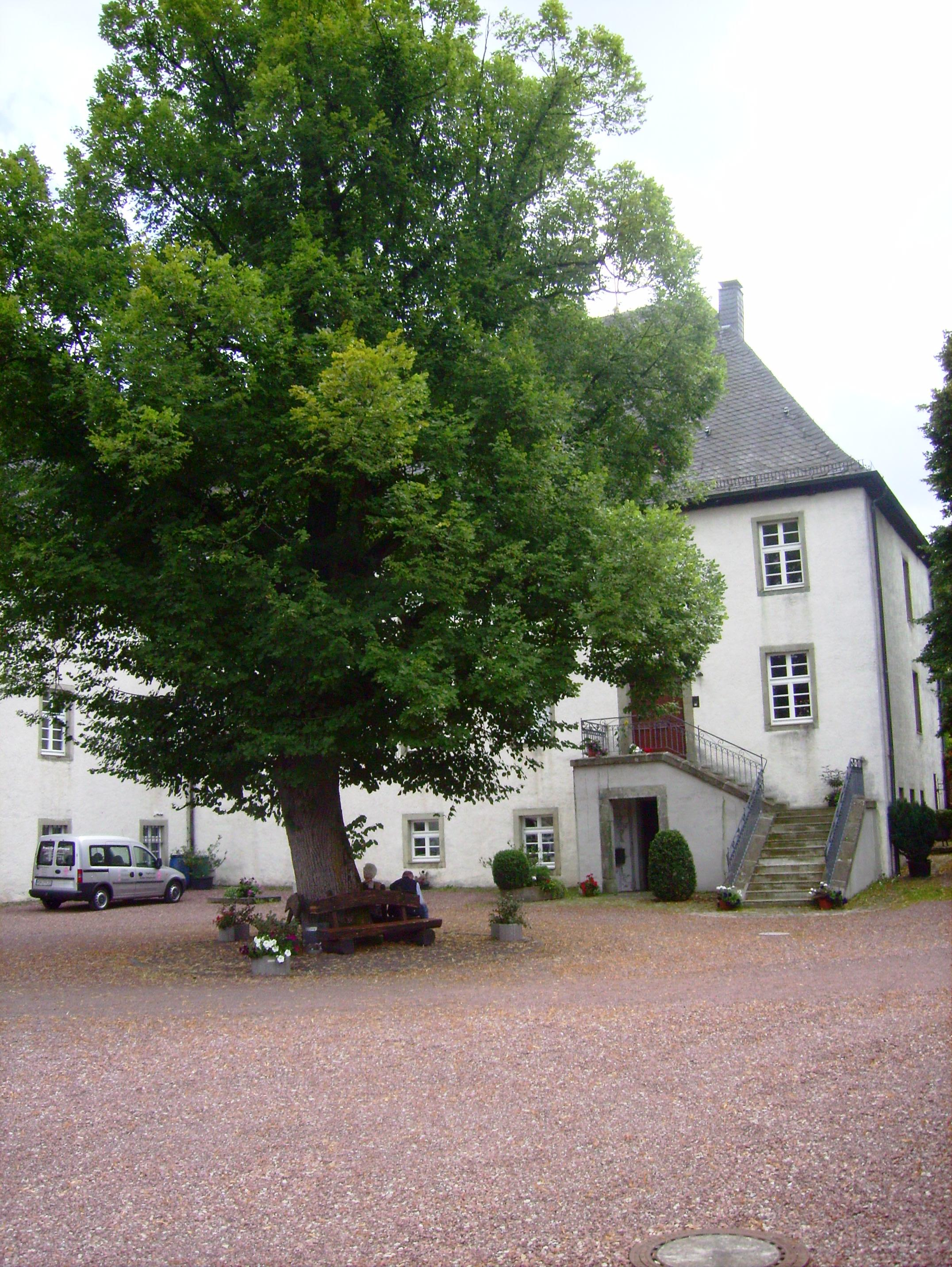 Kloster Oelinghausen - Südflügel des Klostergebäudes